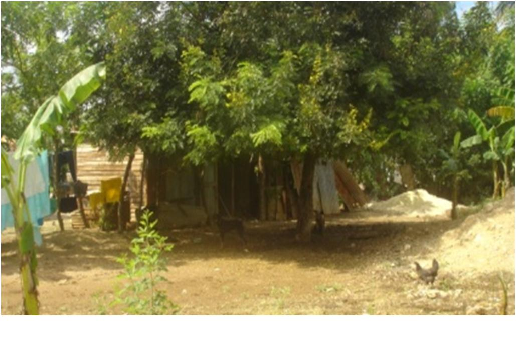 El Brisal, San Pedro de Macorís, República Dominicana.